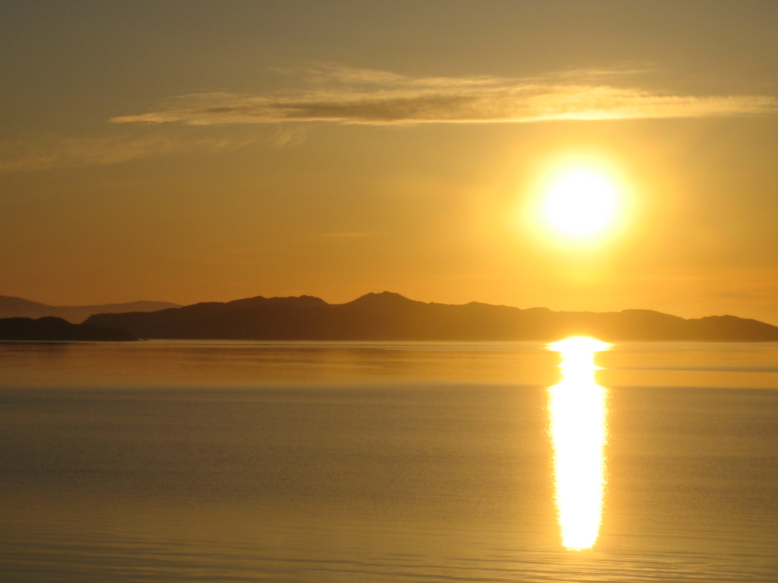 midnattssola i juni nede på Furuflaten